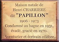 Cette plaque a été inauguré par Marc Champel et Vincent Didier dans le village de Saint-Étienne-de-Lugdarès devant l'ancienne ecole et maison ou est né Henri Charrière, dit "Papillon" le célèbre Bagnard